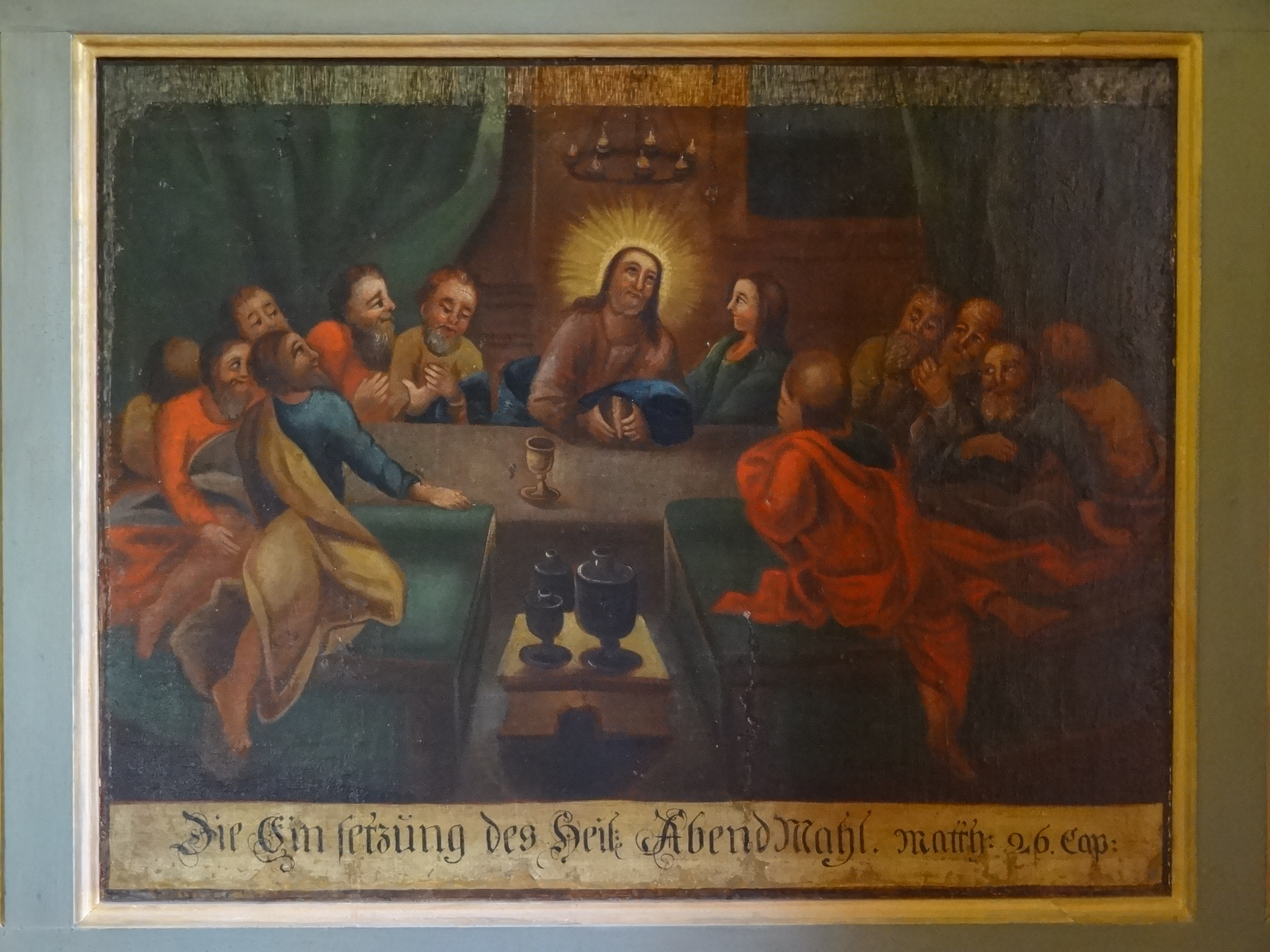 Evangelische Kirche (Oppenrod)